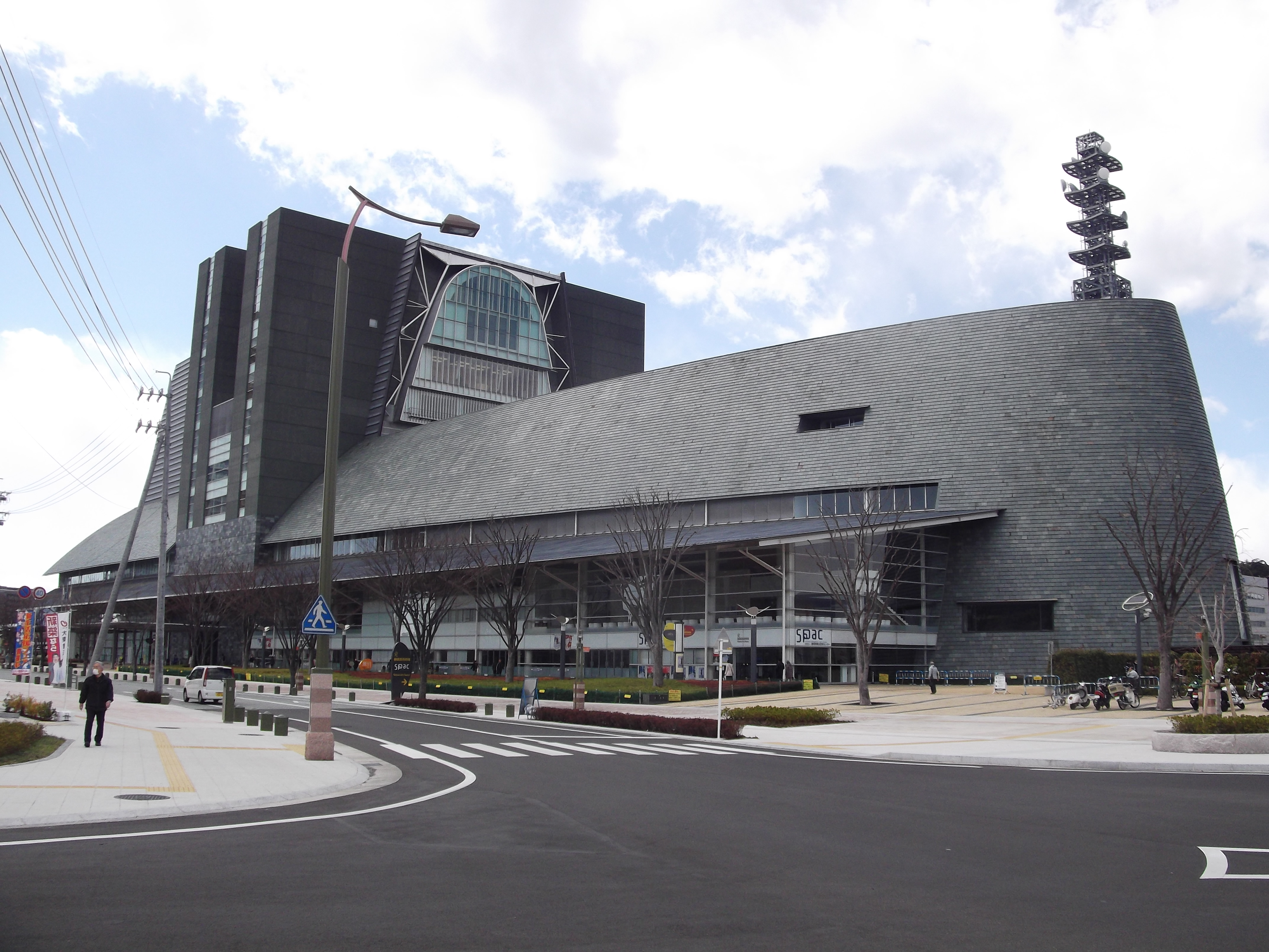 グランシップを東側から撮影。